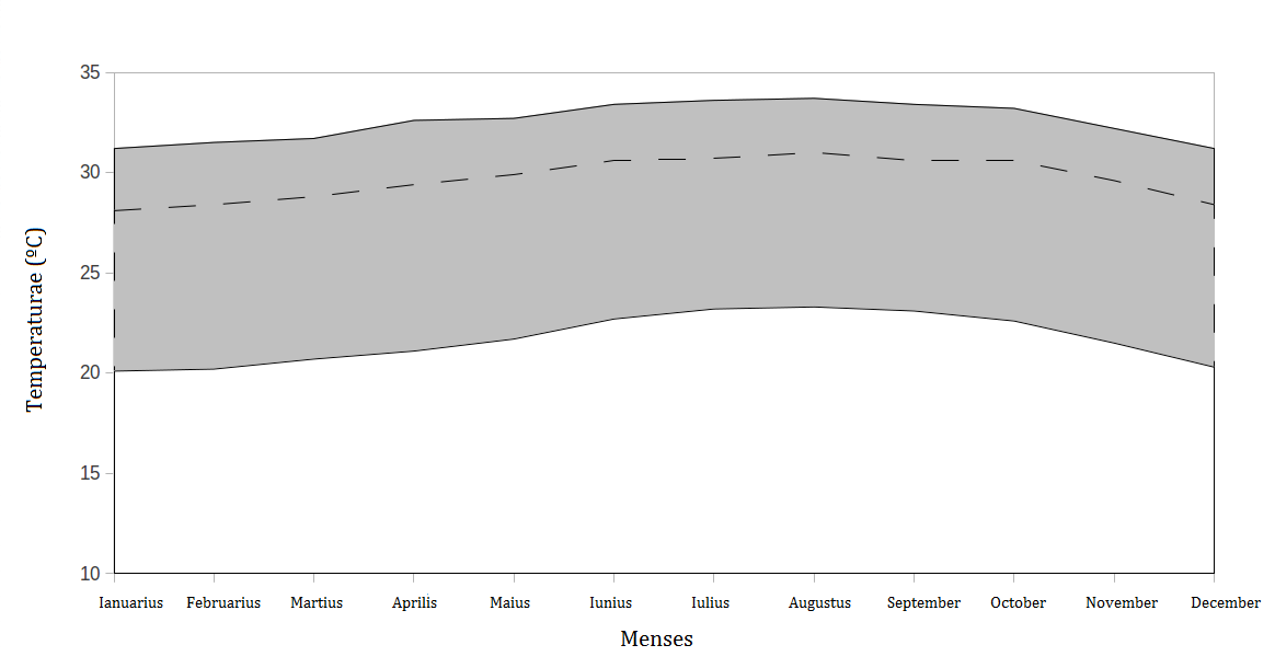 Maximarum temperaturarum campus et media ratio (secta linea) in Portorico.